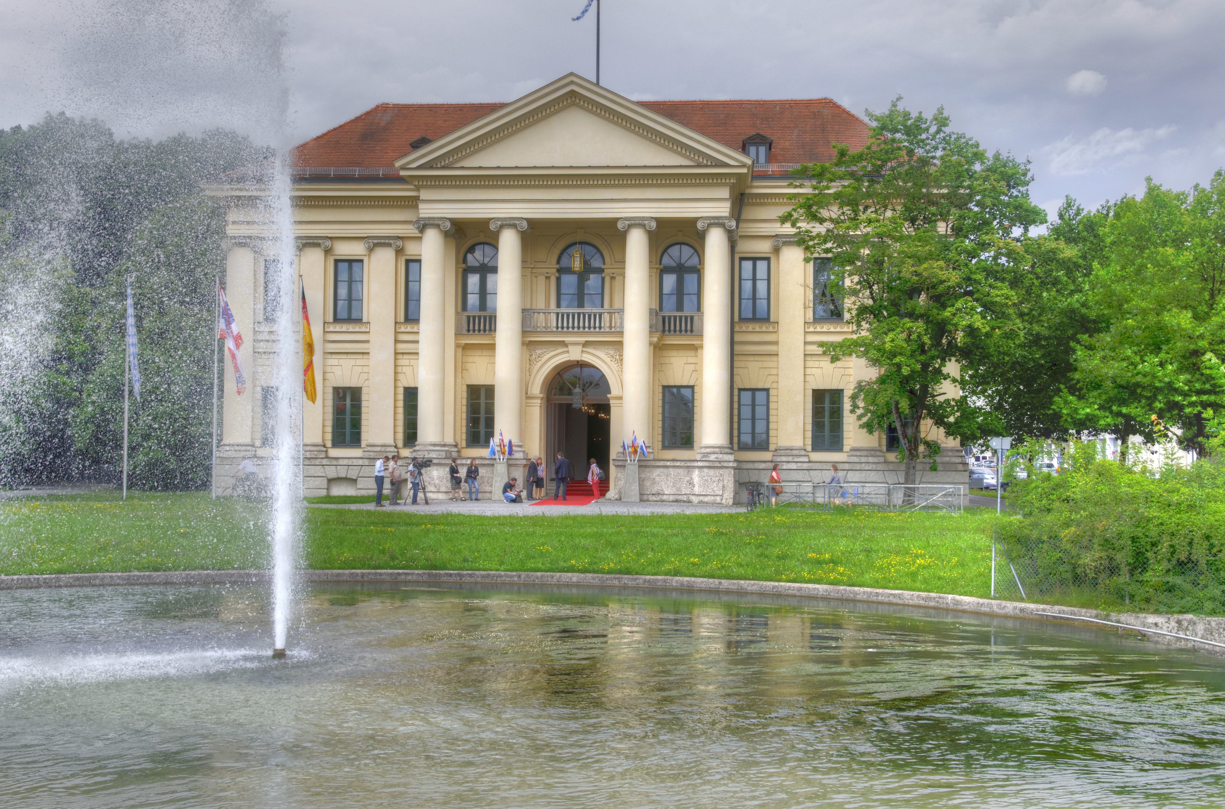 Landtagsprojekt Bayern - Prinz-Carl-Palais